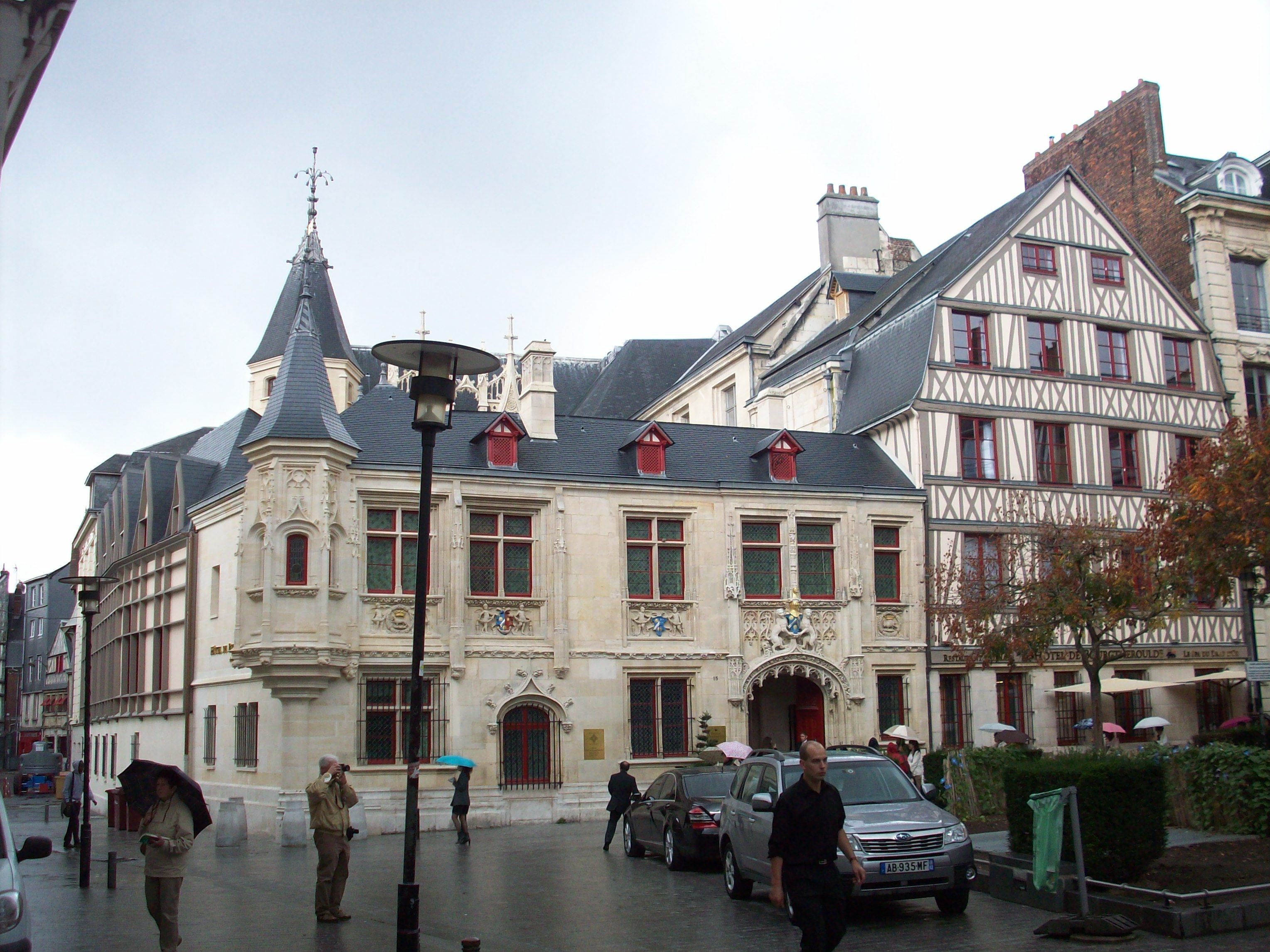 Hôtel de Bourgtheroulde, vu depuis la place de la Pucelle.